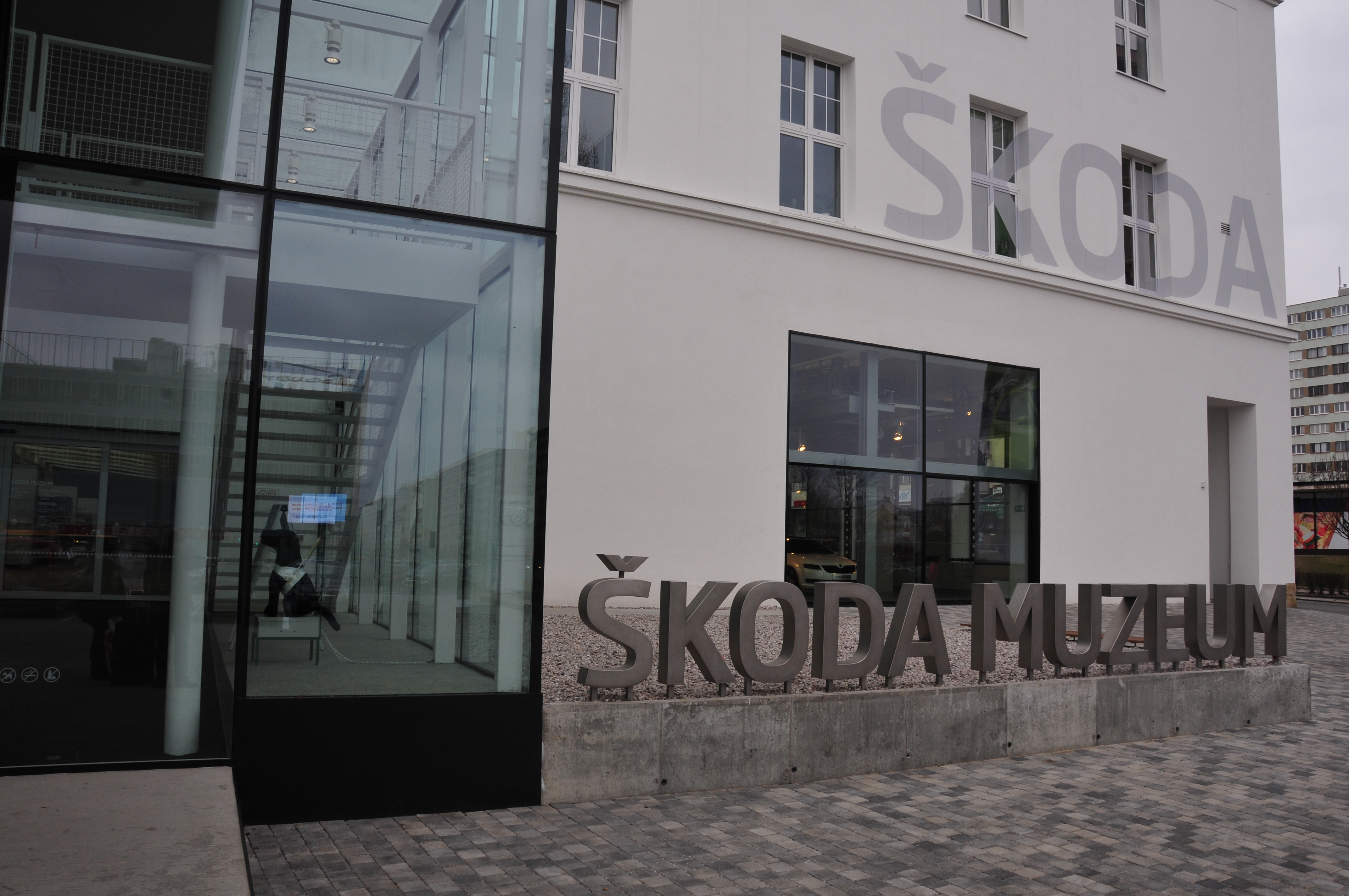 Fototermin Škoda Museum Mladá Boleslav 2013 Fototermin Škoda Muzeum 5. April 2013 in Mladá Boleslav This work is free and may be used by anyone for any purpose. If you wish to use this content, you do not need to request permission as long as you follow any licensing requirements mentioned on this page.